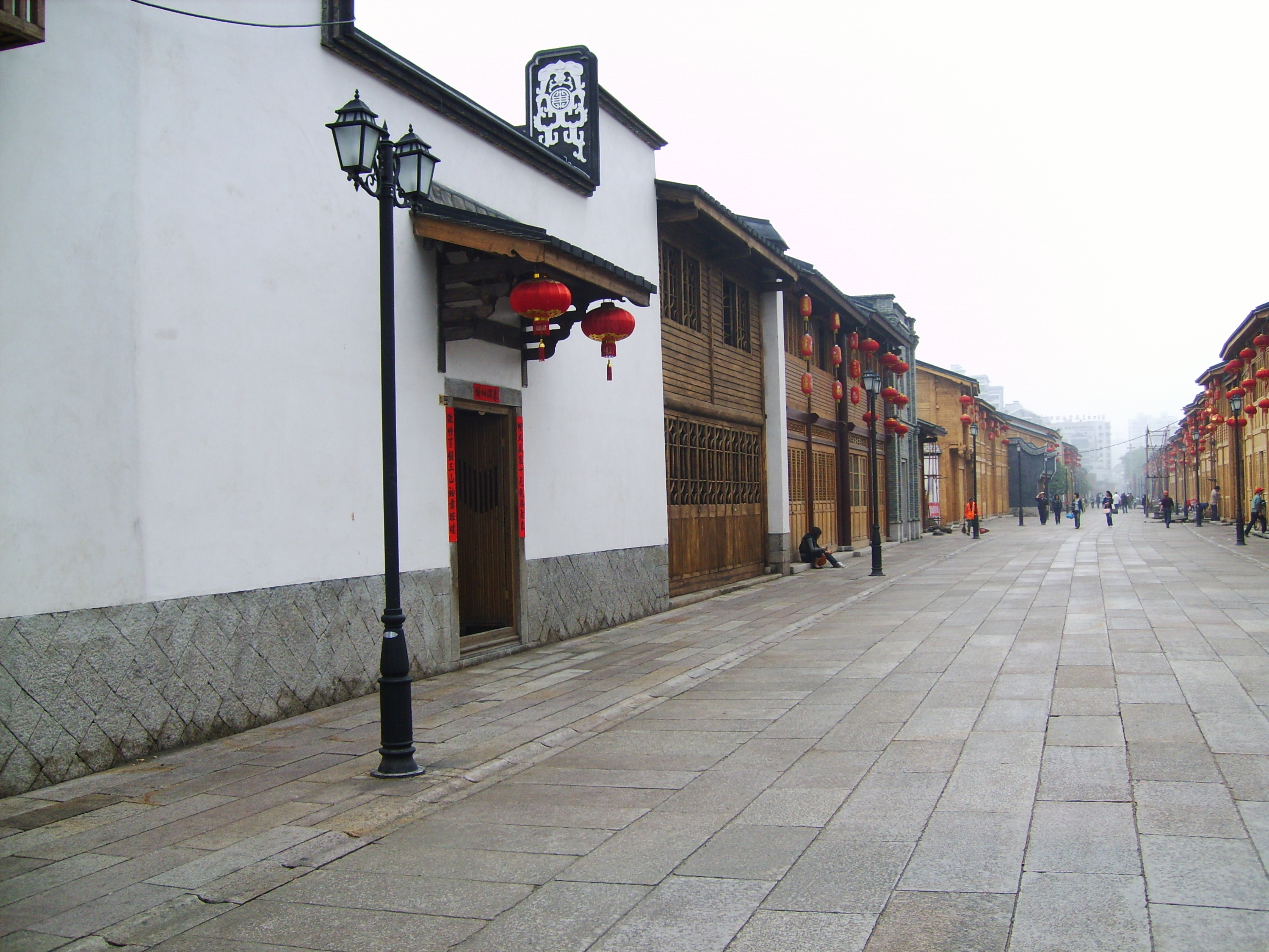 福州南后街oeotwc